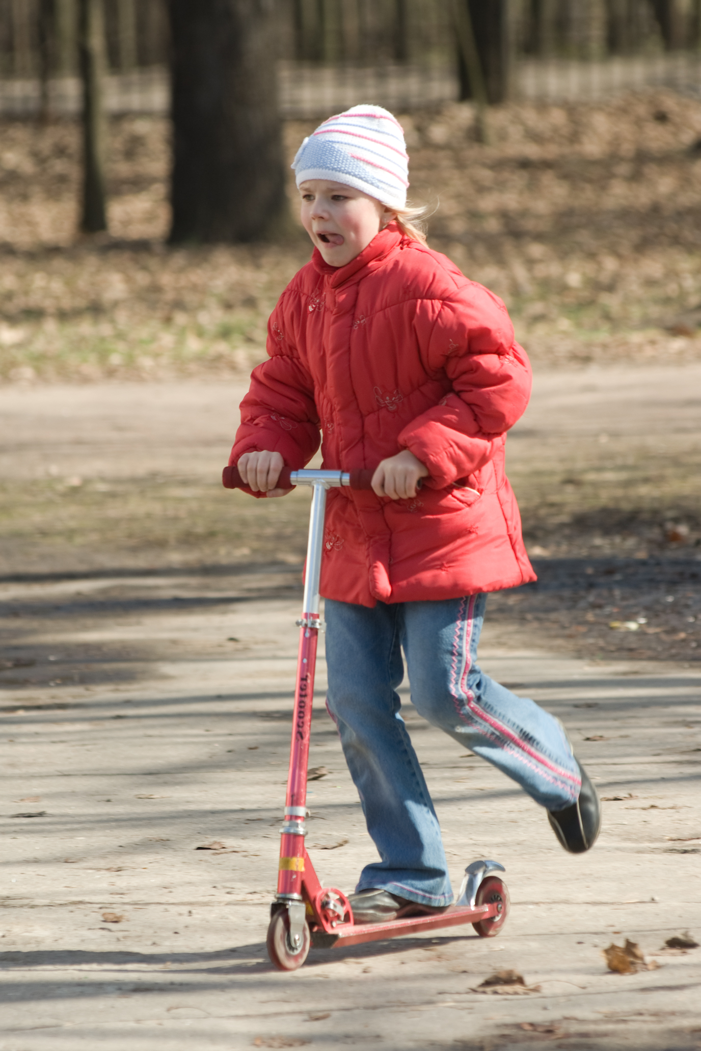 Девочка на самокате (Екатерингоф)